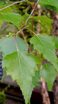 River Birch.